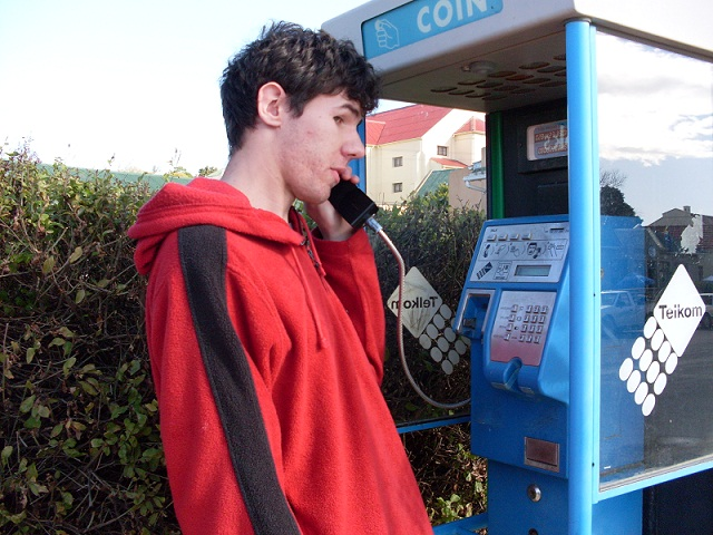 Telefoonhokkie en gebruiker